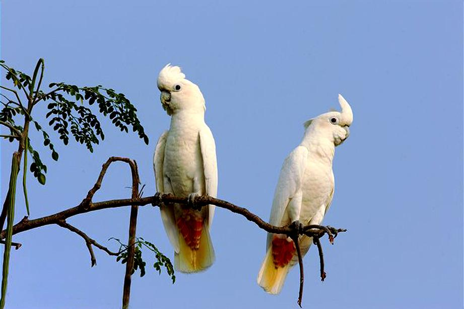 Cacatua haematuropygia